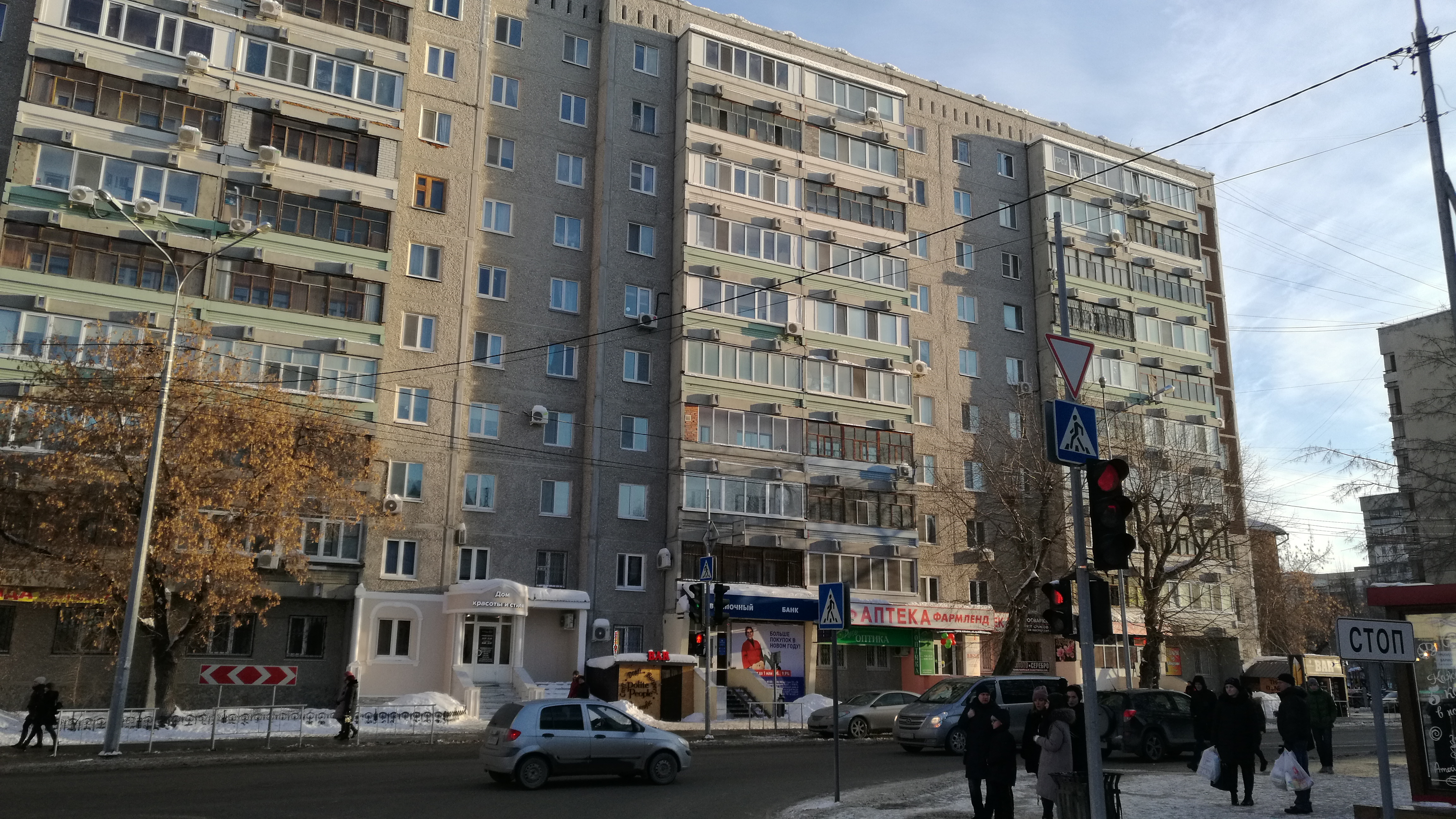 Kruciĝo de la stratoj Ĥoĥrjakov kaj Gorkij. Loĝdomo ĉe la strato Fabriĉnaja, 1. Tjumeno, Rusio.